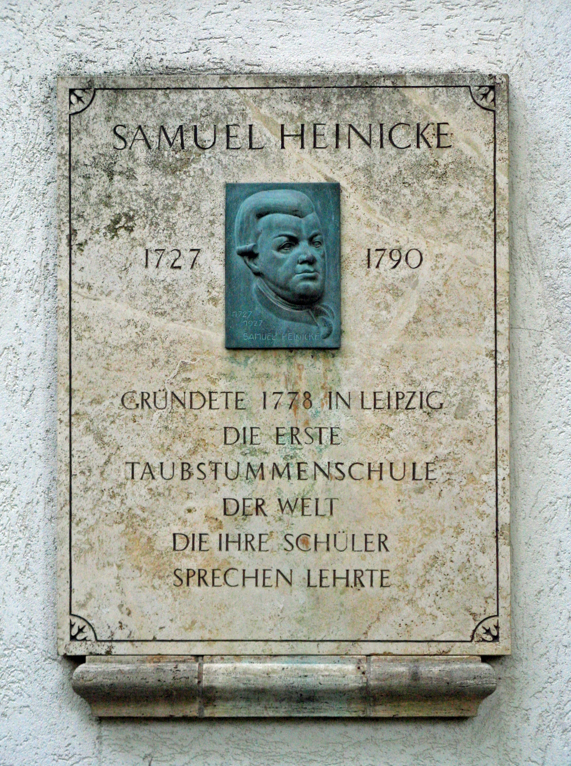 Grabtafel am Grab Samuel Heinickes auf dem Leipziger Südfriedhof, I. Abteilung